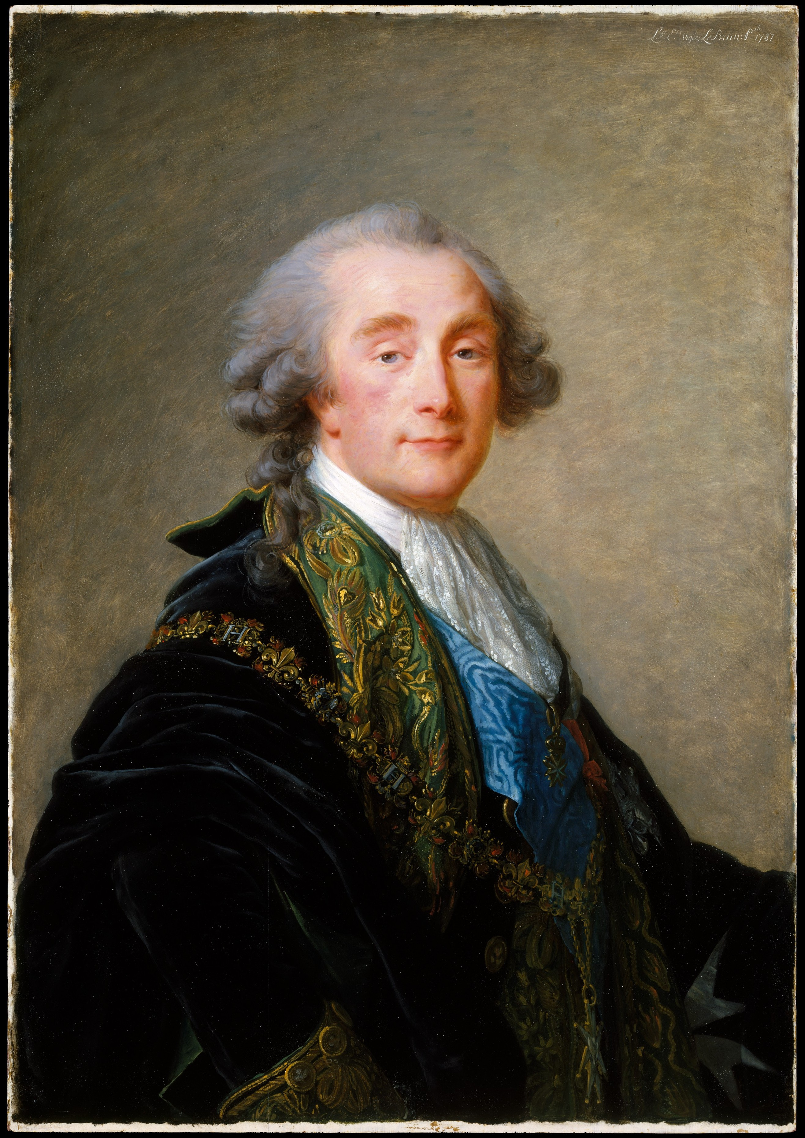 Portrait of Alexandre Charles Emmanuel de Crussol-Florensac (1747–1815)